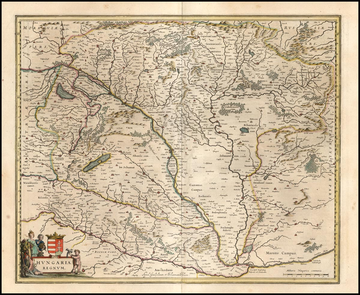 Magyarország térképe 1634-ből, Az Atlas Maior, sive Cosmographia Blaviana, a XVII. század nagy reprezentatív atlaszkiadásának egyike